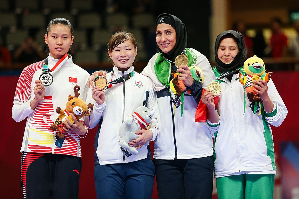 حمیده عباسعلی در مسابقه رده‌بندی کاراته بازی‌های آسیایی ۲۰۱۸